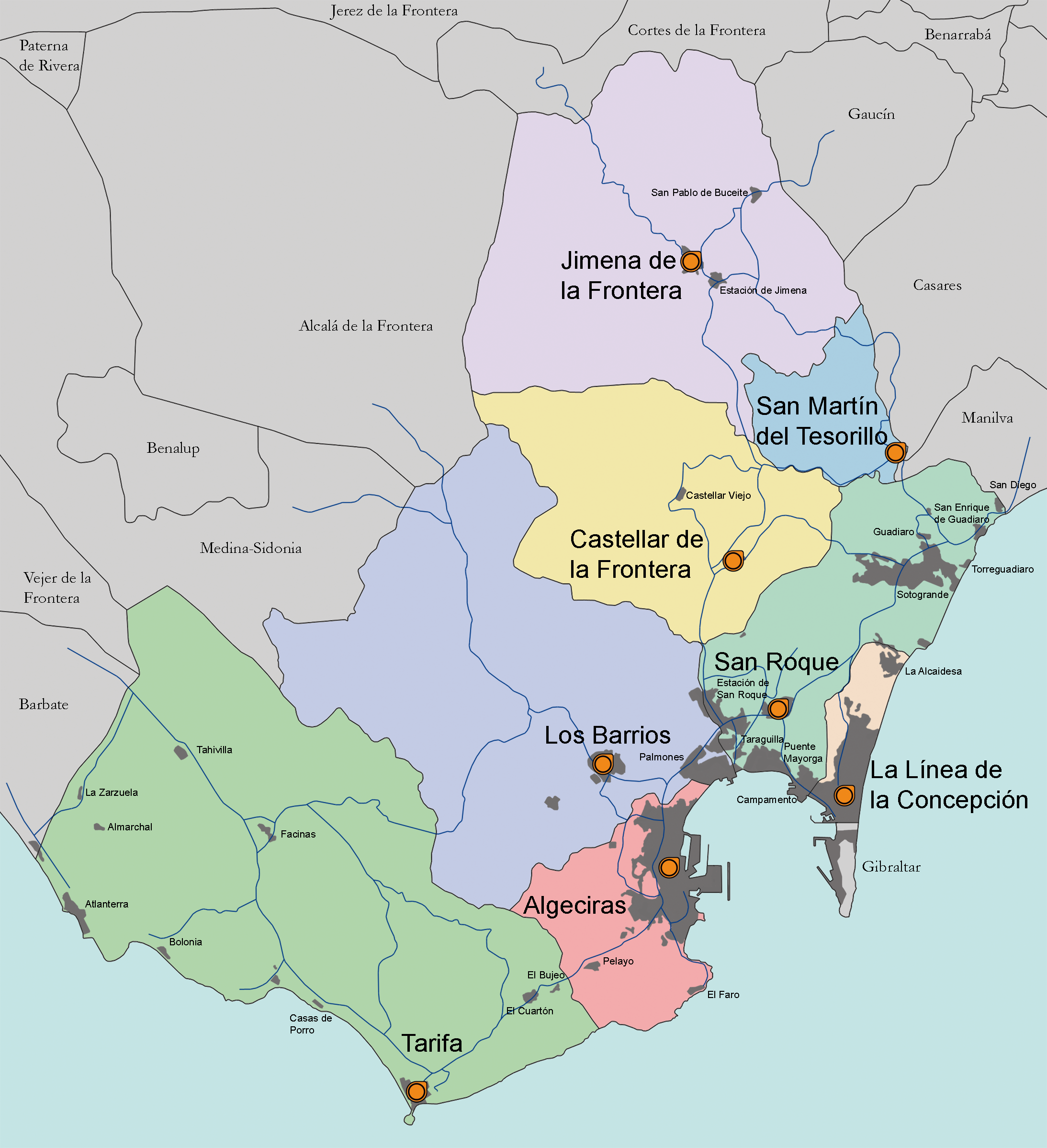 Mapa indicativo de las áreas urbanas del Campo de Gibraltar, Andalucía, España